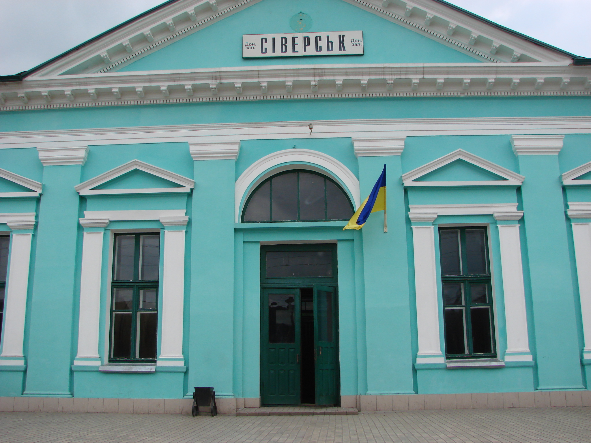 Залізнична станція в місті Сіверську